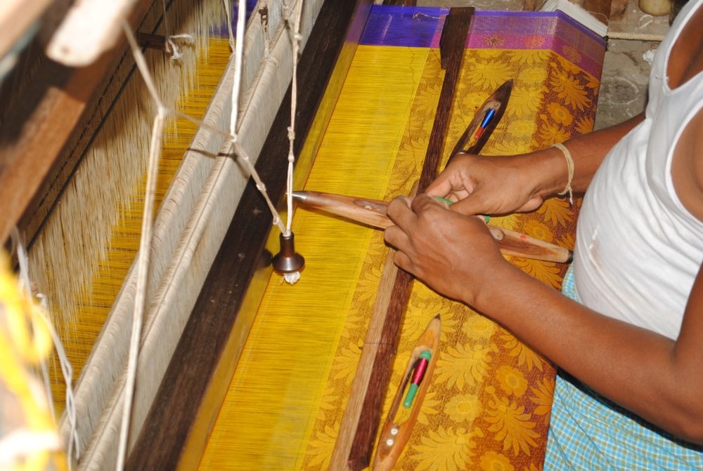 பட்டுத்தறியில் கைவண்ணம் காண்பிக்கும் காட்சி